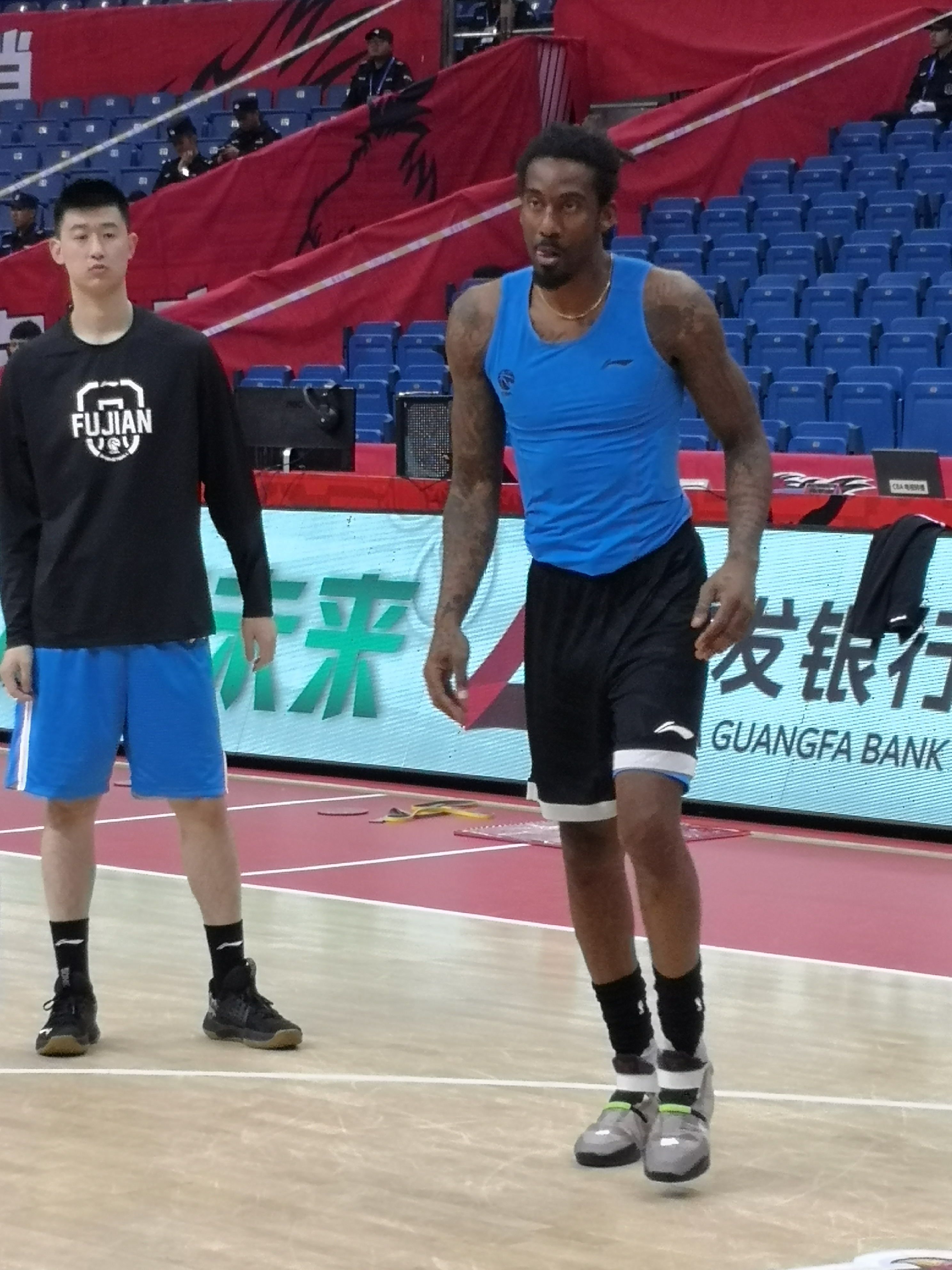 中文（中国大陆）: 2019年11月16日，阿马雷 斯塔德迈尔在与青岛国信双星的比赛前进行热身训练，摄于青岛体育中心国信体育馆